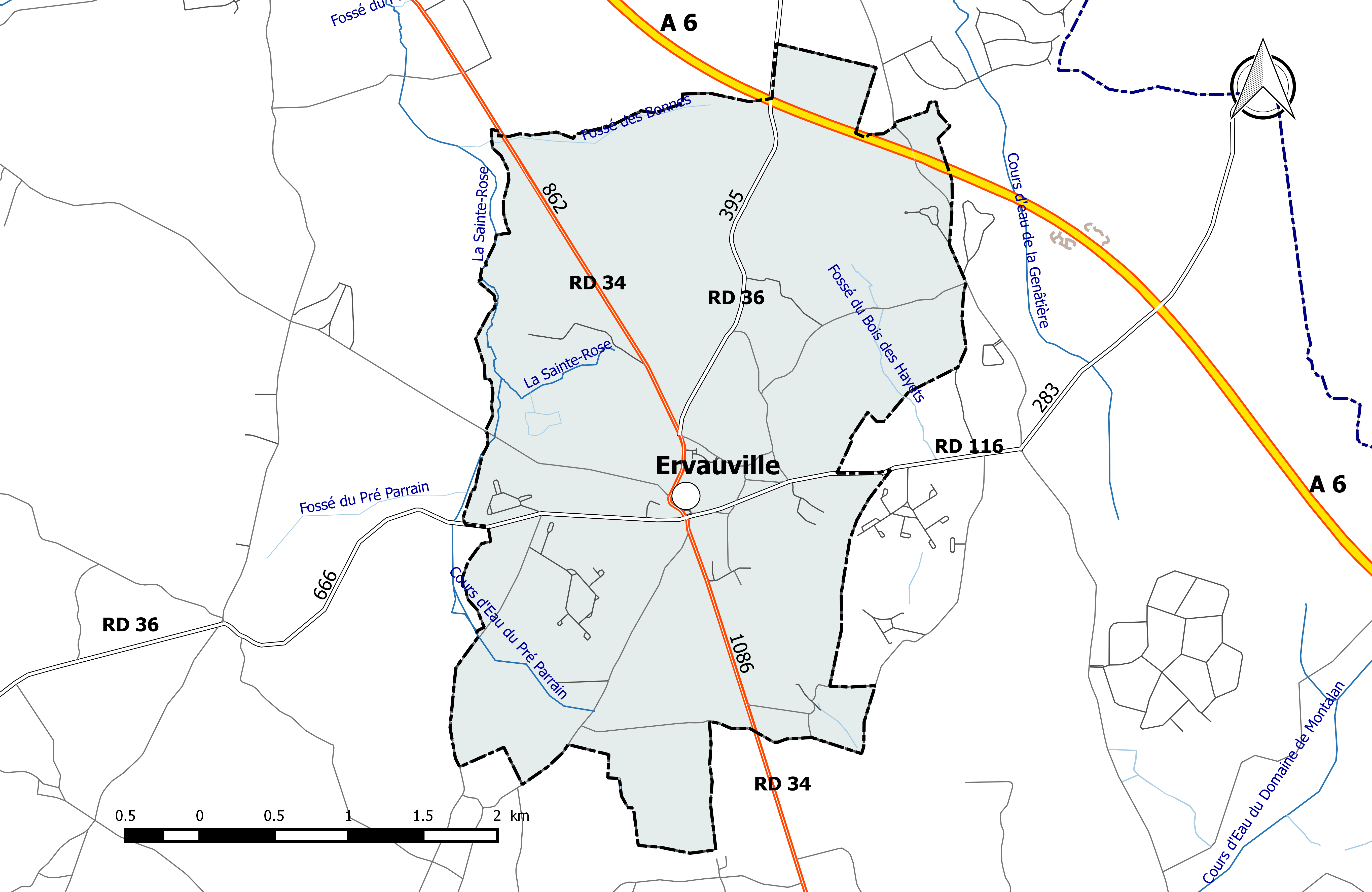 Carte du réseau routier de la commune de Ervauville.